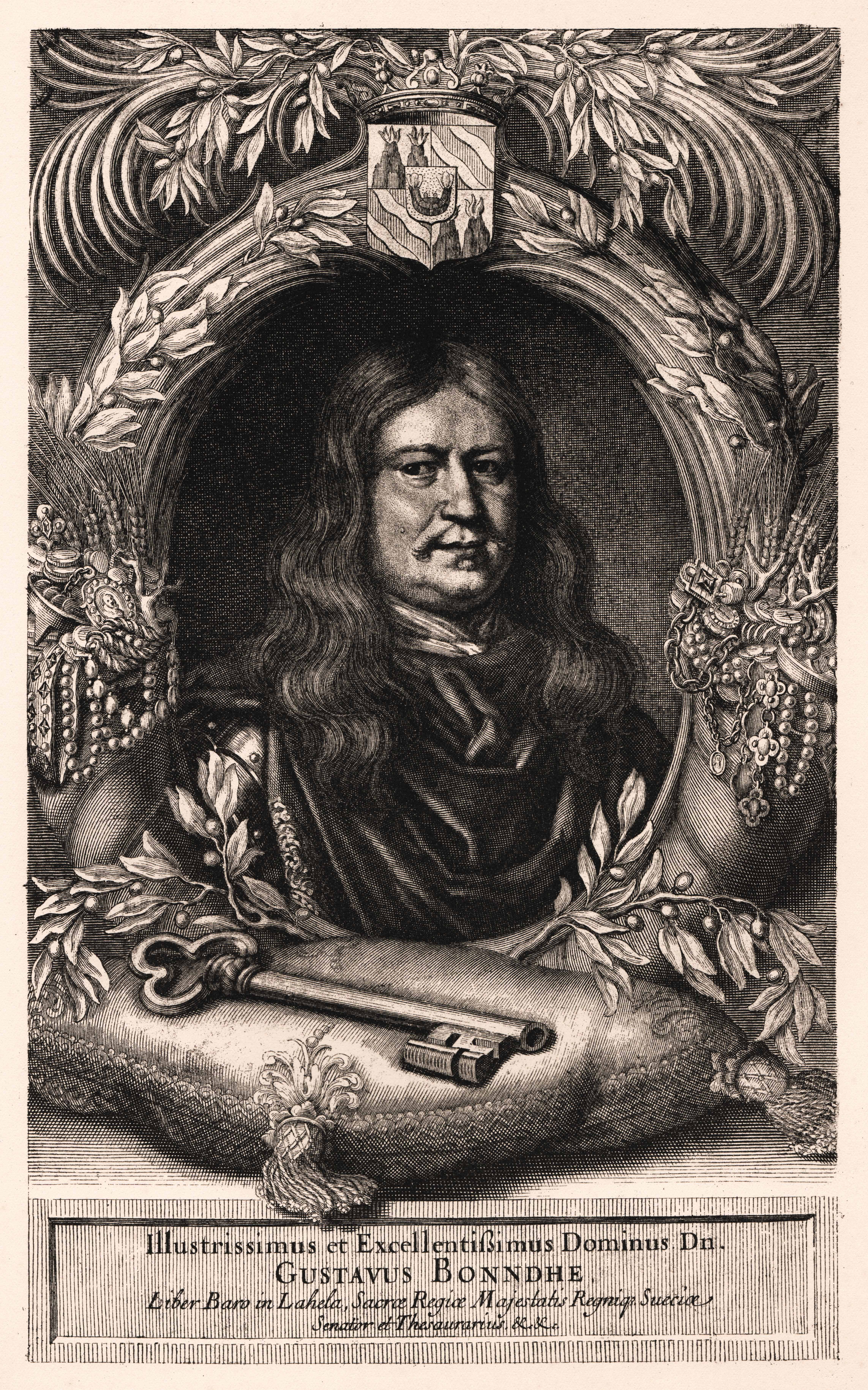 Gustaf Bonde (1620-1667). Kopparstick utfördt af P. v. Schuppen och tillhör Pufendorfs “De rebus a Carolo Gustavo etc.“ Af detta blad finnas flere varianter. En annan gravyr öfver Gustaf Bonde i profil i rund medaljong är utförd af El. Brenner; äfven häraf finnes en variant, som skiljer sig från den förstnämnda därigenom att inramningen är oval.